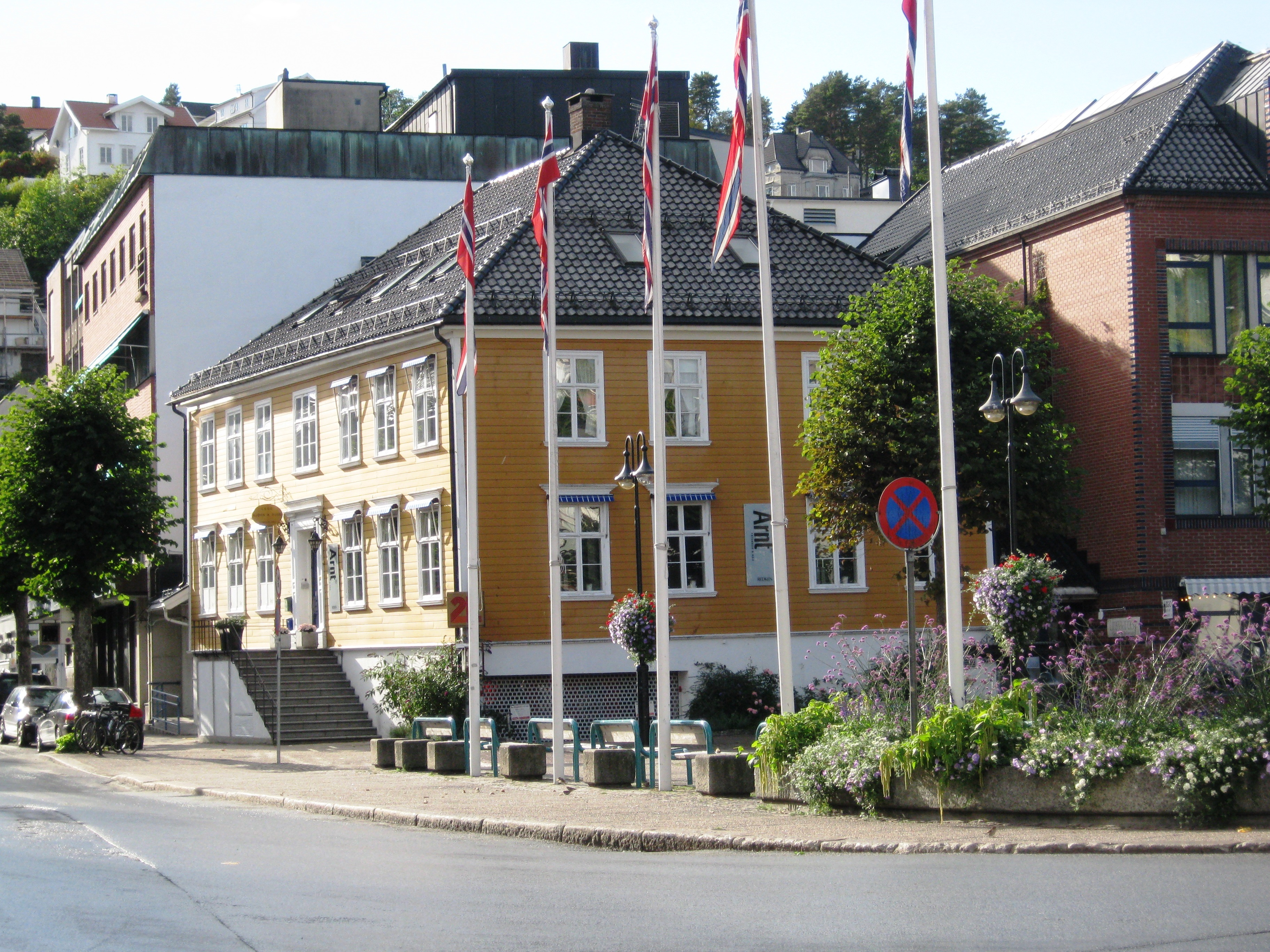 Bondeheimen på Torvet i Arendal